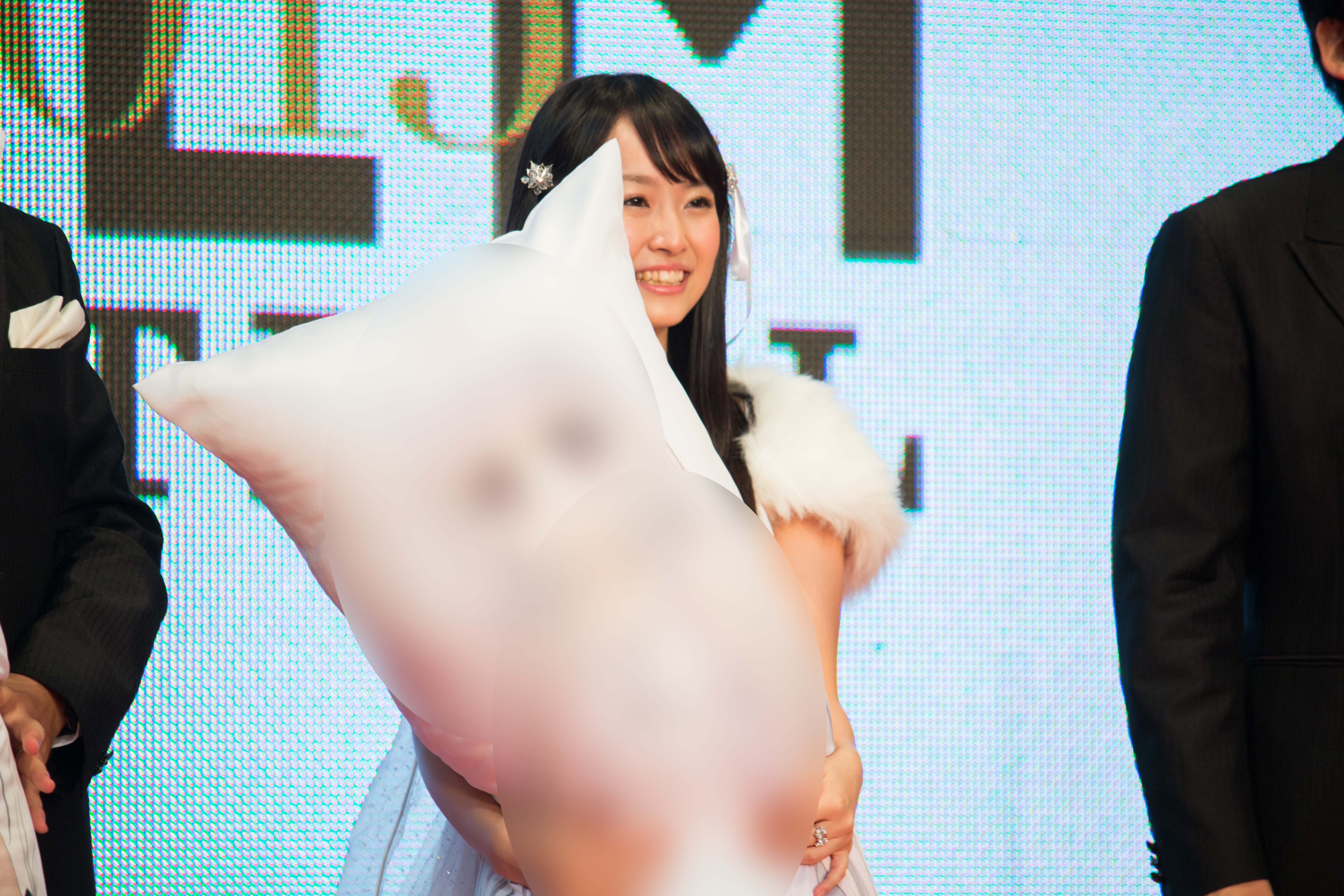 第28回 東京国際映画祭 オープニングセレモニー 汐谷文康と同棲中の花守ゆみり (ガラスの花と壊す世界)